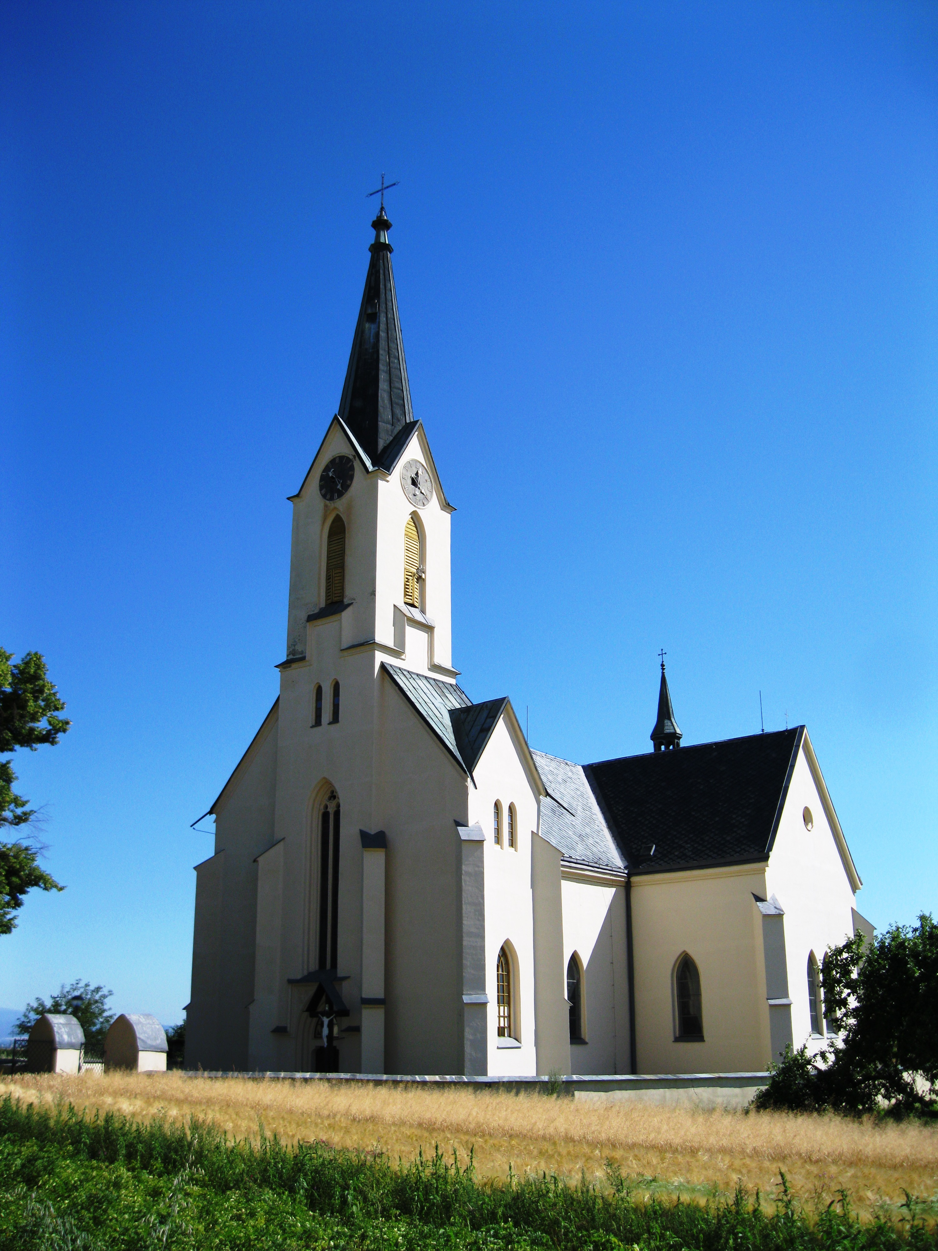 Kostel Nanebevzetí P. Marie (Cholina), Cholina